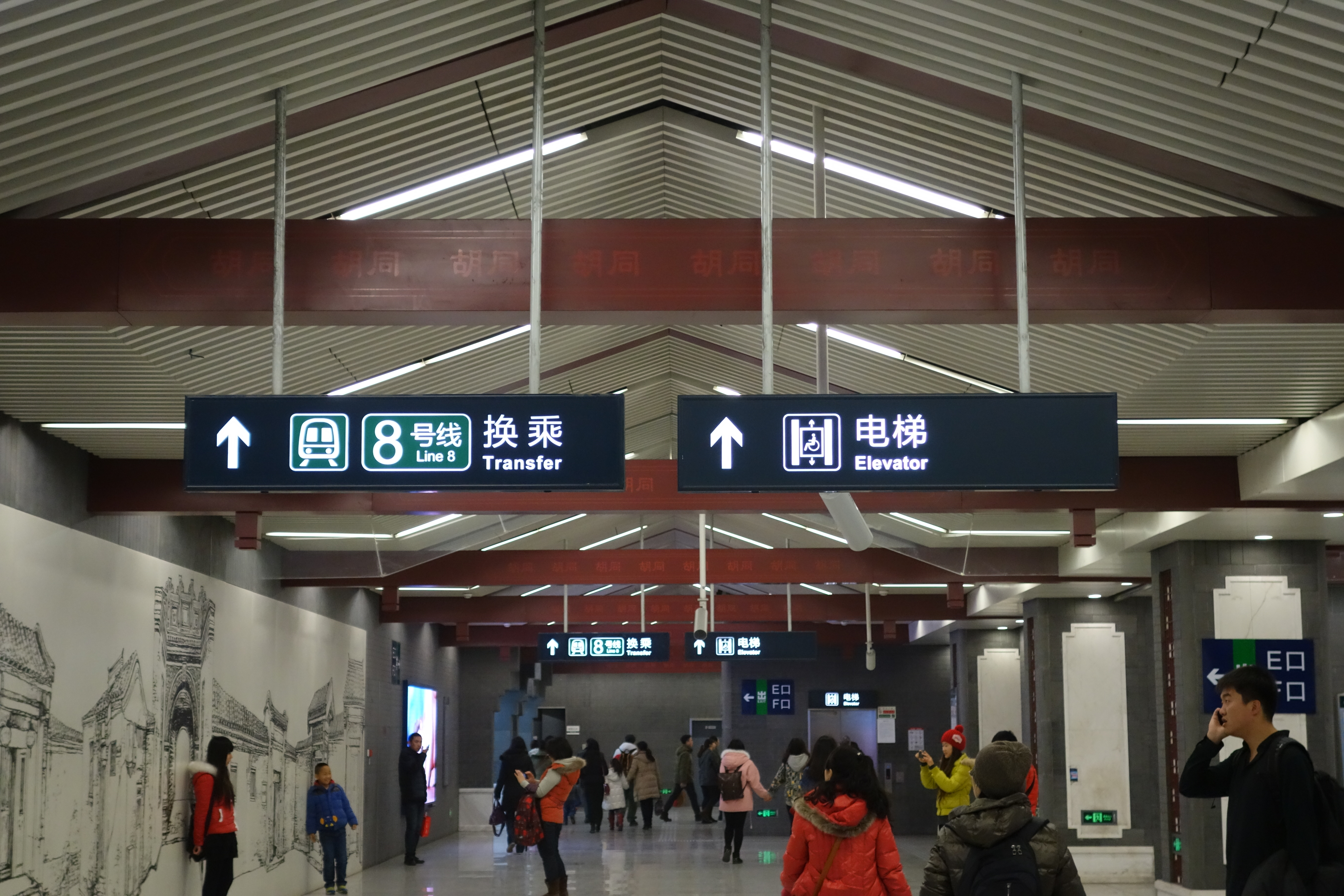 南锣鼓巷6号线站台内的换乘标志